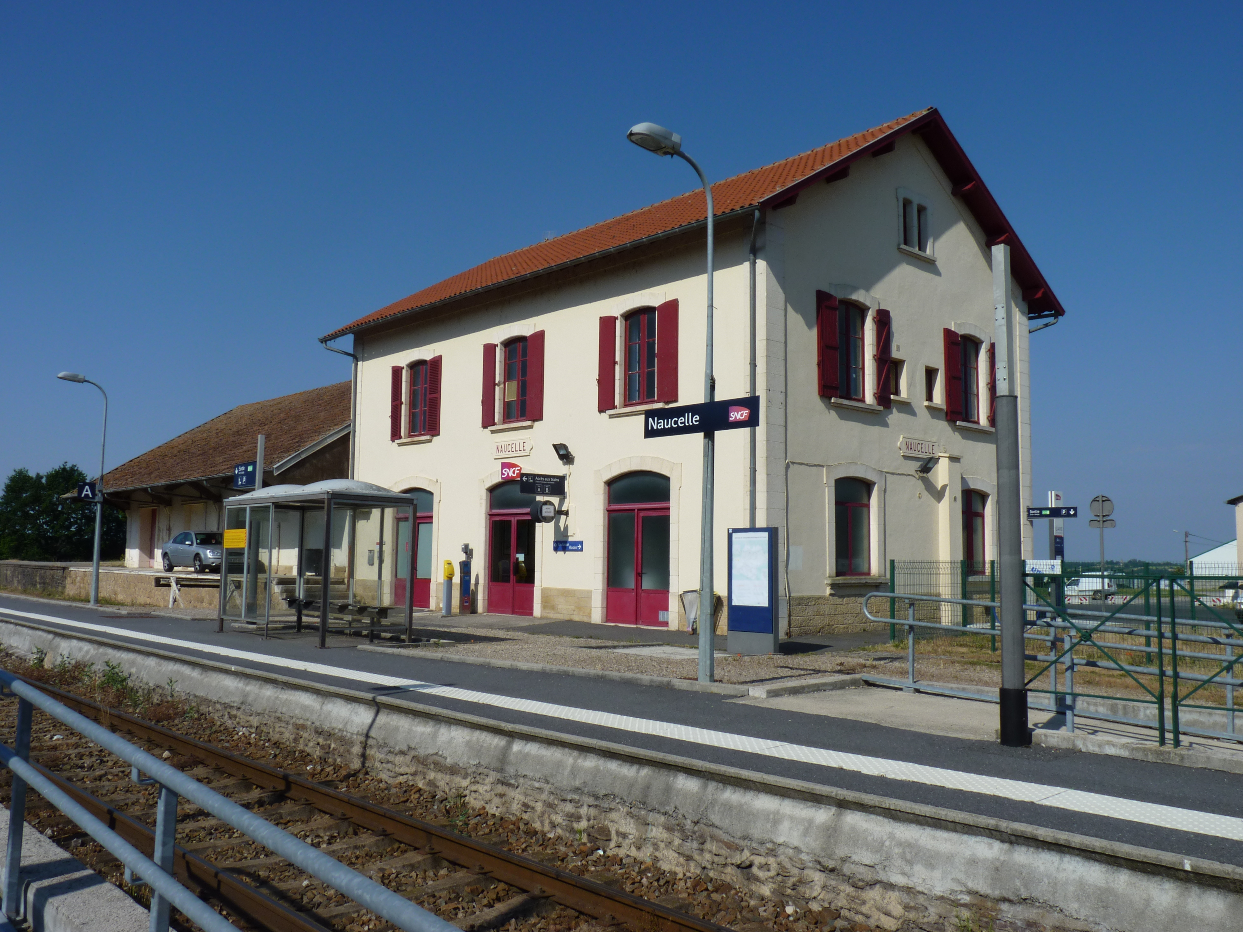 Gare de Naucelle